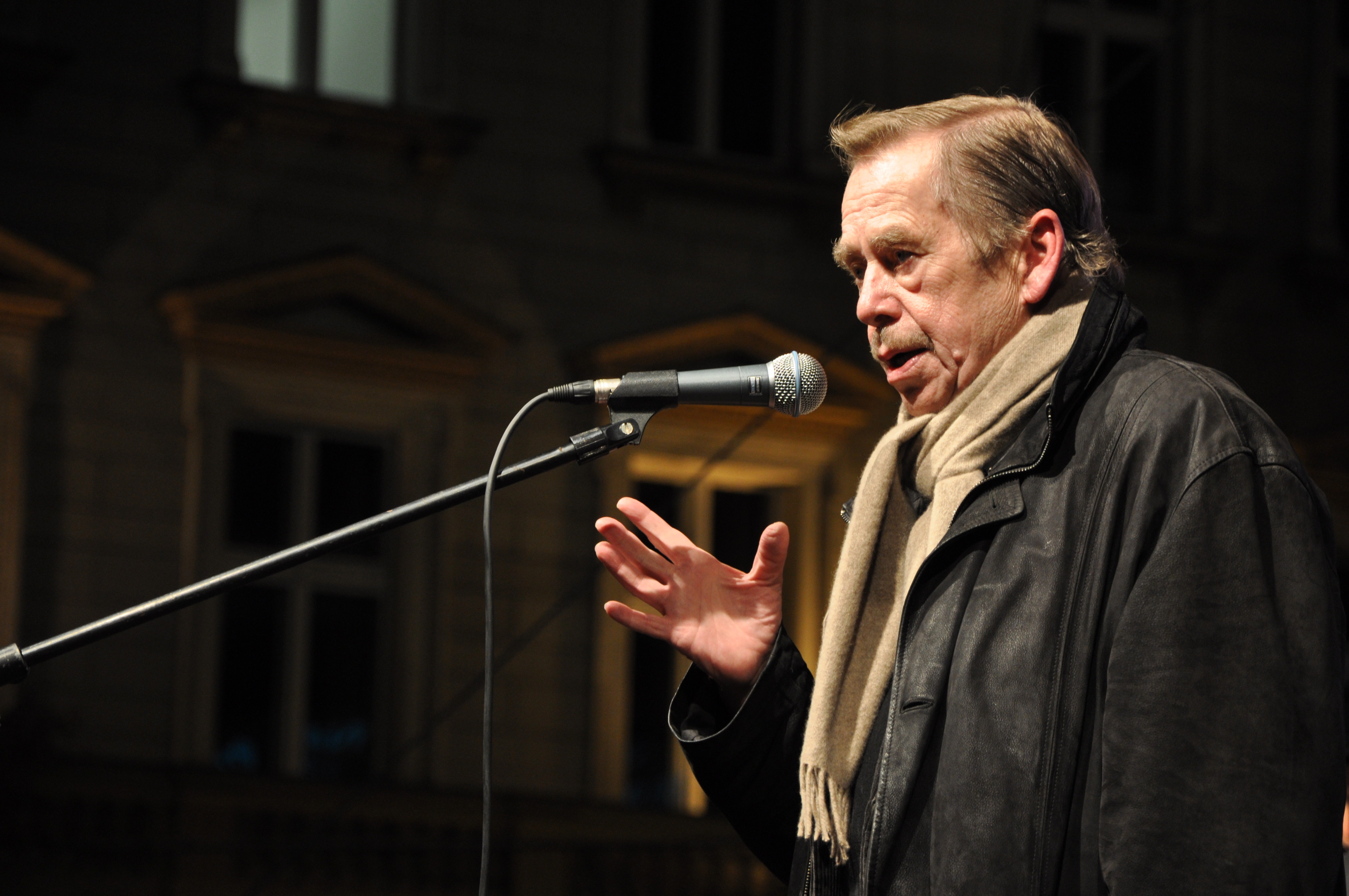 Václav Havel na Václavském náměstí 17. listopadu 2009.